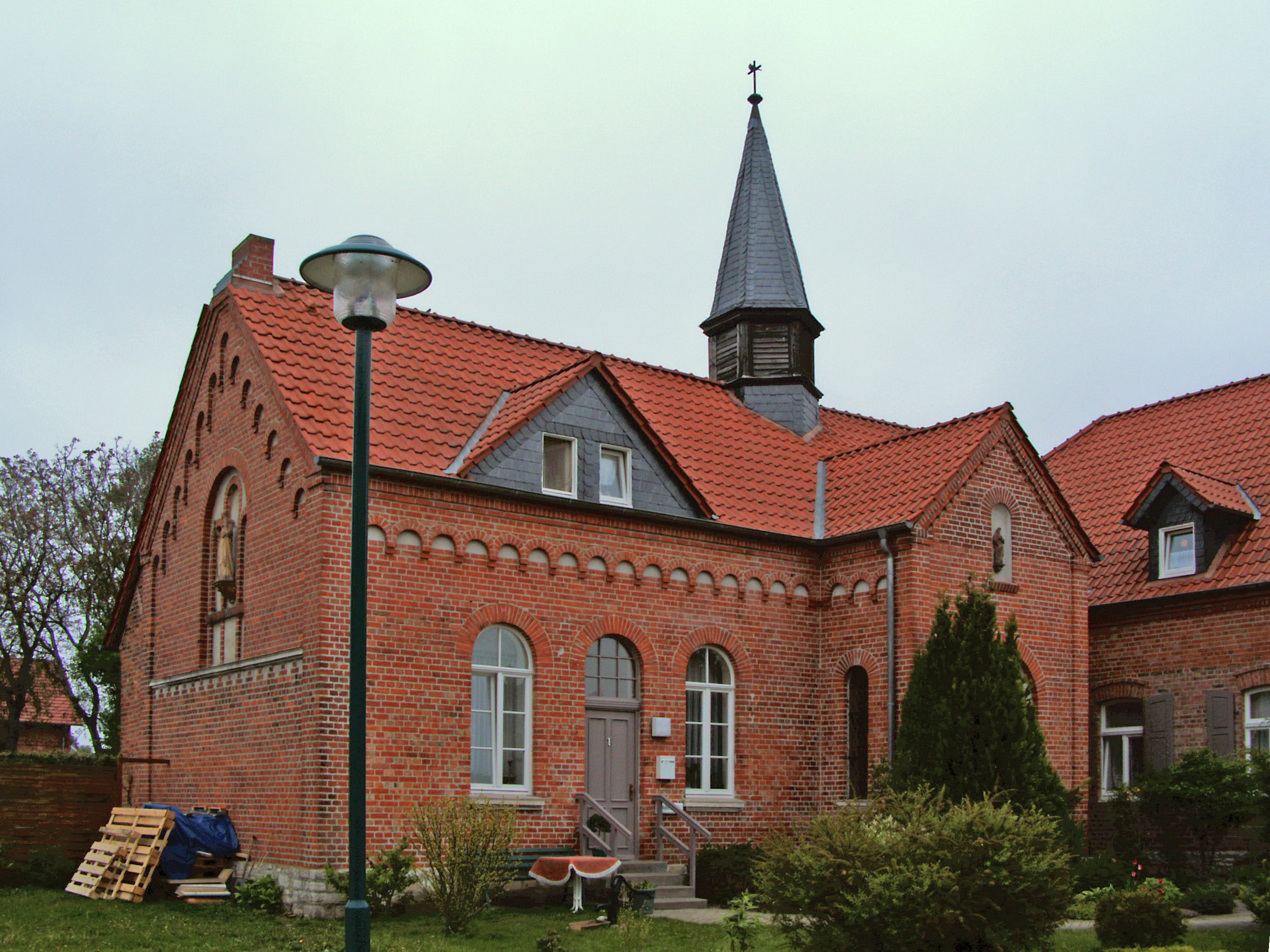 Ehemalige katholische Kirche in Neuwegersleben, Landkreis Börde